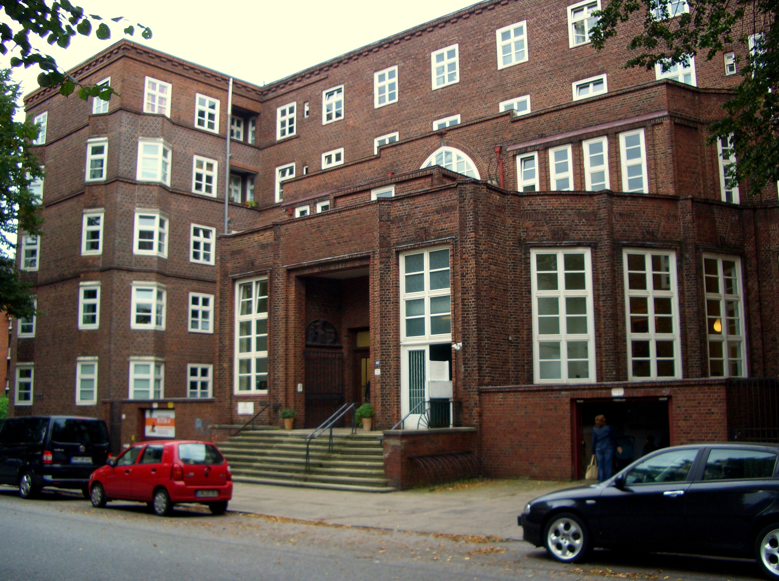 AOK-Gebäude in Hamburg-Borgfelde, Bethesdastraße / Burgstraße, Eingang zur Schalterhalle; erbaut 1924-1925 nach Entwurf der Hamburger Architekten Architekten Hermann Distel und August Grubitz; nach Kriegsschäden verändert, unter Denkmalschutz This is a photograph of an architectural monument.